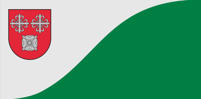 Raunas novada karogs